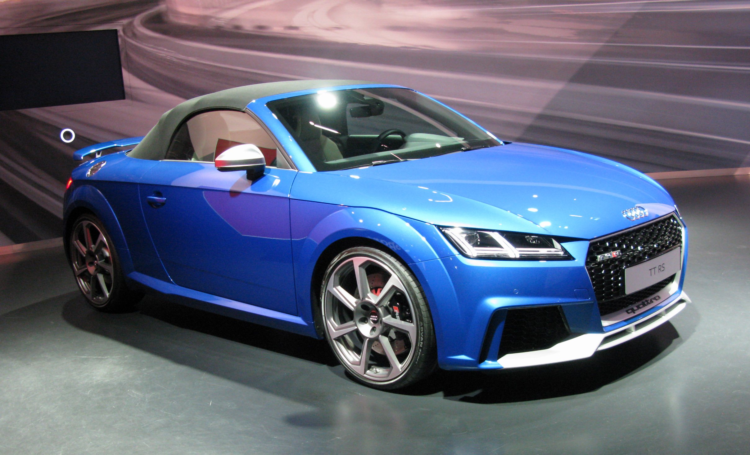 2017 Audi TTRS